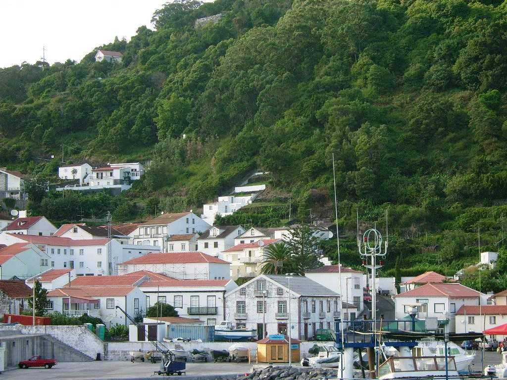 Vista parcial da Calheta, ilha de São Jorge, Açores, Portugal